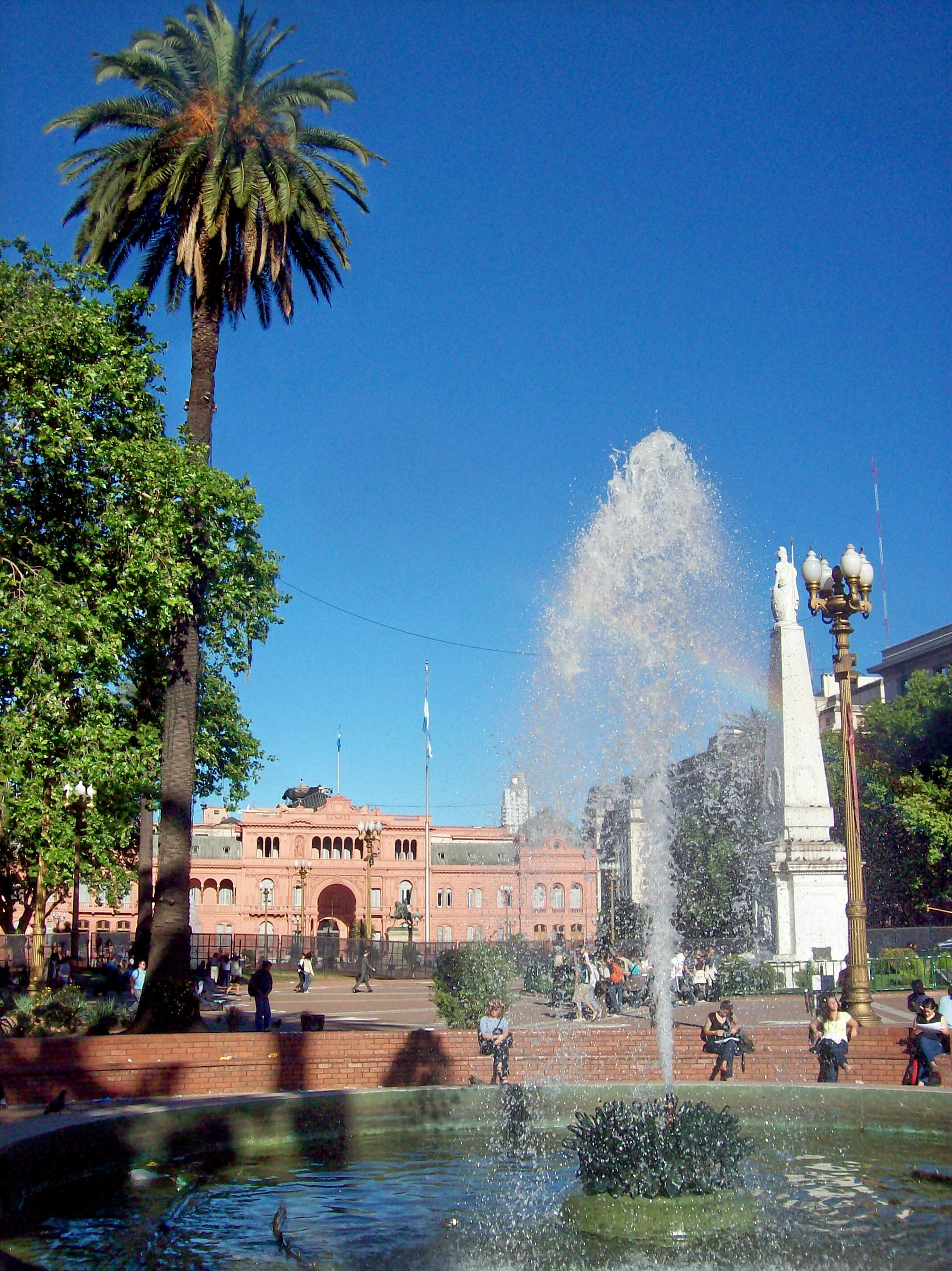 Fuente, Pirámide, Palmera y Bandera Argentina en Plaza de Mayo, Ciudad Buenos Aires, Argentina. Al fondo: Casa Rosada